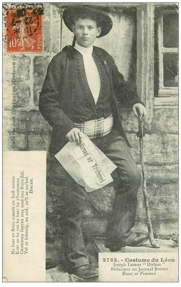 Jos Le Bras / Joseph Lebras - costume du Léon